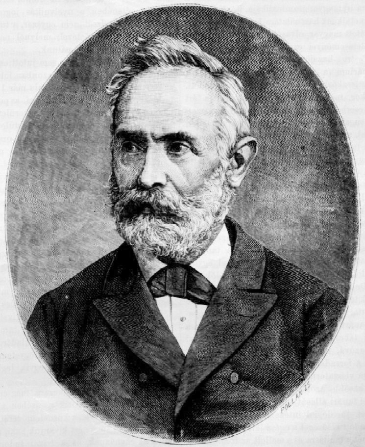 Ballagi Mór (1815–1891) nyelvész, akadémikus portréja. Pollák Zsigmond metszete Klösz György fényképfelvétele alapján